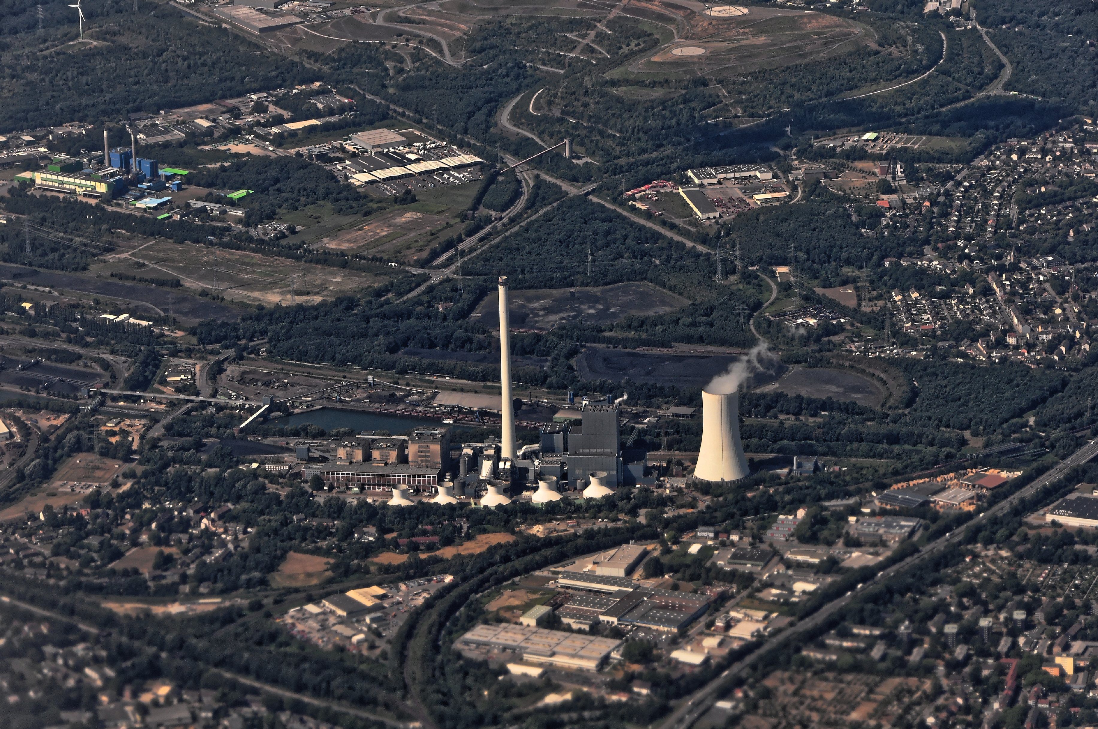 Bilder vom Flug -Rom-Düsseldorf-Hamburg 2013 Dieses Foto entstand in Zusammenarbeit mit Stadtbesichtigungen.de Die Seiten Stadtbesichtigungen.de, der dazugehörige Reise Blog sowie die Facebookseite: Stadtbesichtigungen Rom dürfen dieses Bild für Ihre Veröffentlichungen ohne den Hinweis auf Wikipedia, Commons bzw der Lizenz verwenden. Die Verantwortlichen habe von mir (Ra Boe) die Originaldaten zur freien Verfügung übermittelt bekommen.